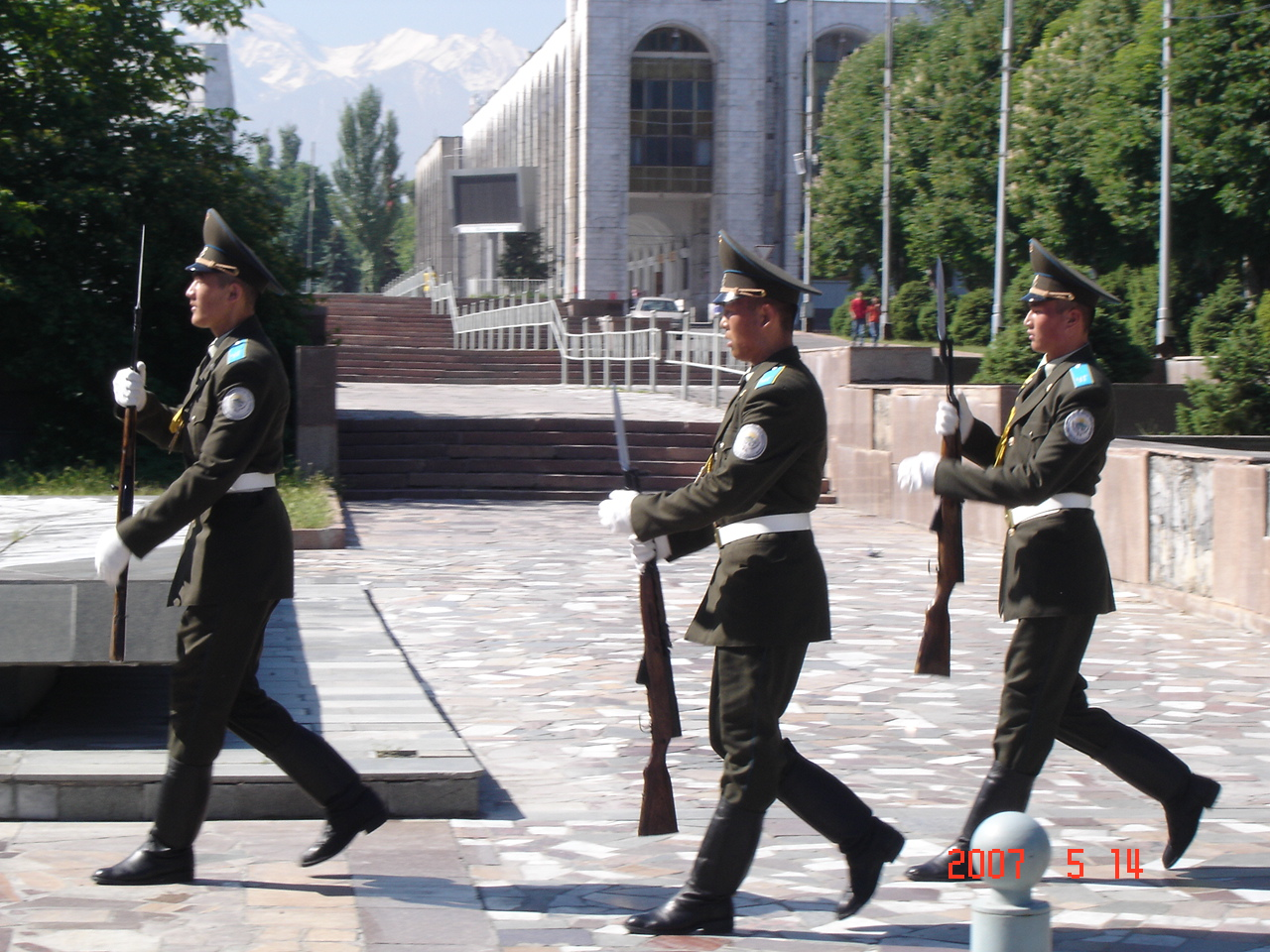 廣場上的衛兵交接(比什凱克)